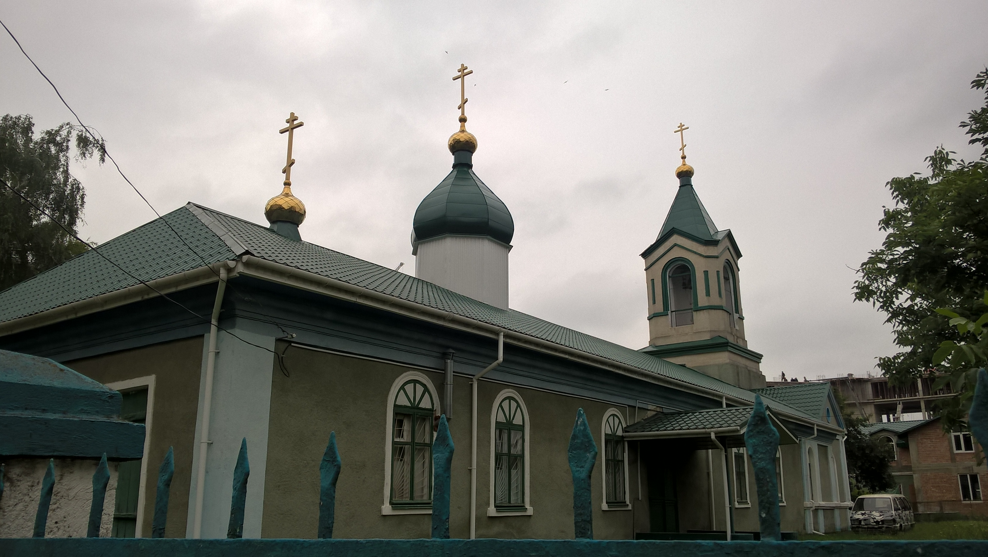 Cerkiew staroobrzędowa w Tyraspolu